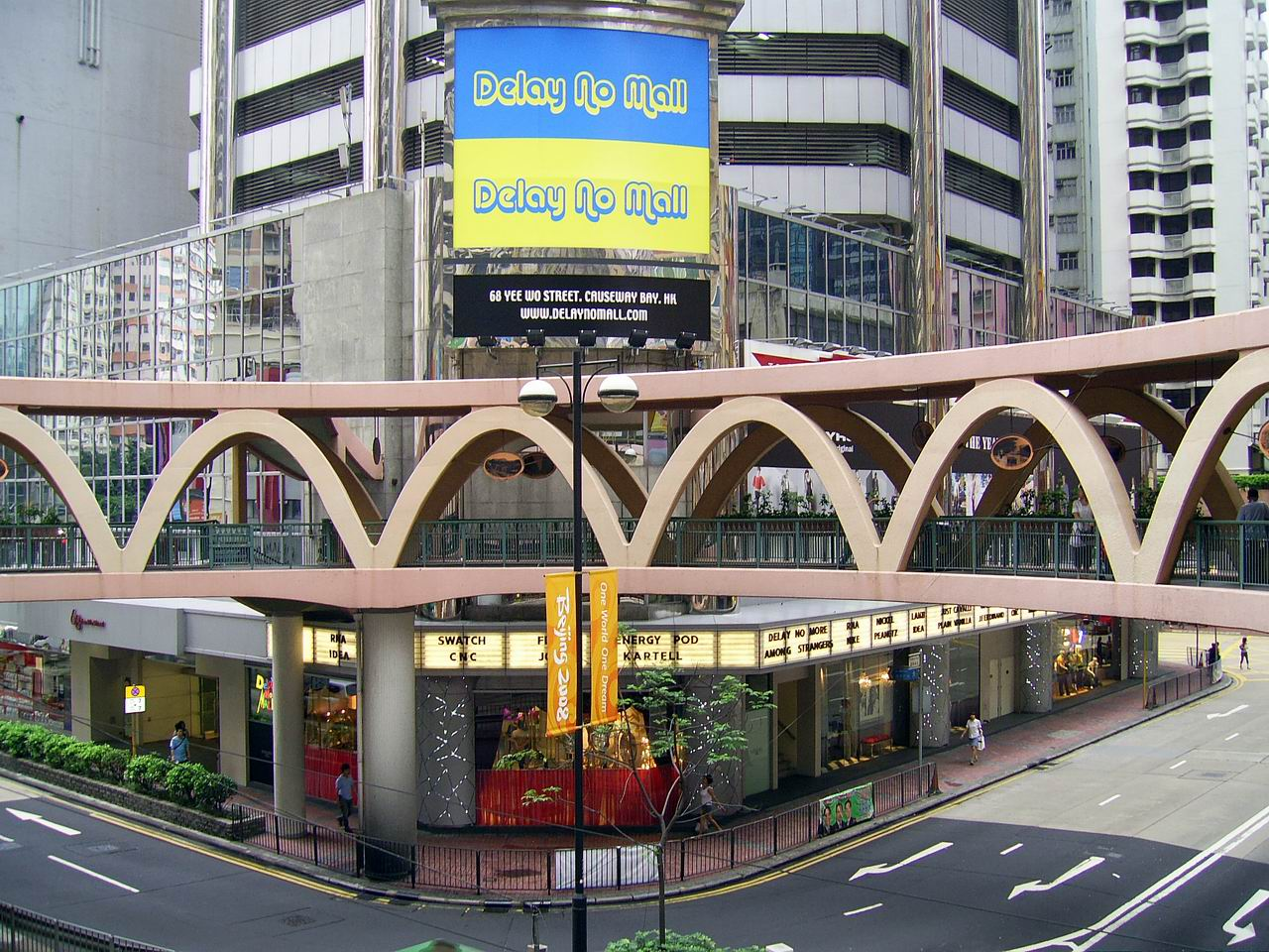 中文（香港）: 「Delay No Mall」商場